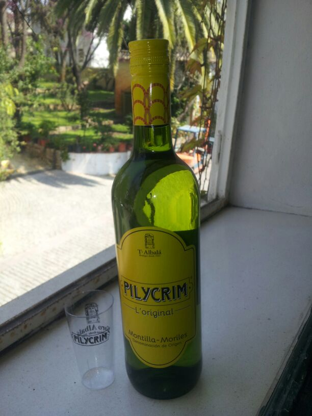 PILYCRIM